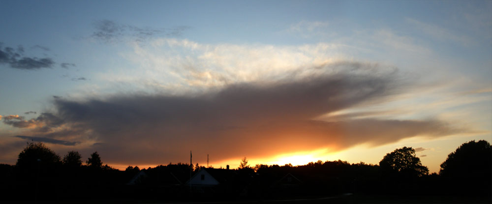 Cirrus Spissatus Cloud in Linköping, Sweden